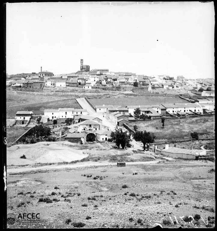 Imatge